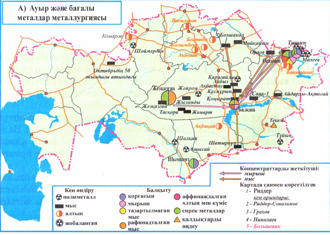 Түсті металлургия